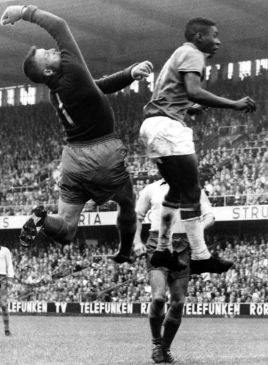 RioKalle